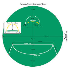 Field set up circular